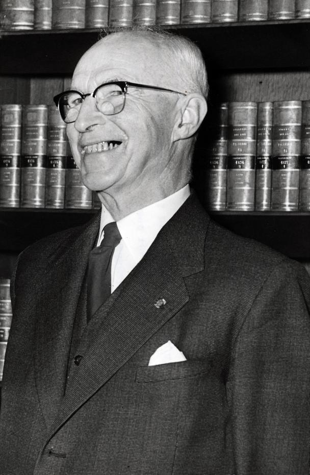 Prof. Mr. R. Kranenburg, lid van de Raad van State. Den Haag, Nederland, 27 september 1955.